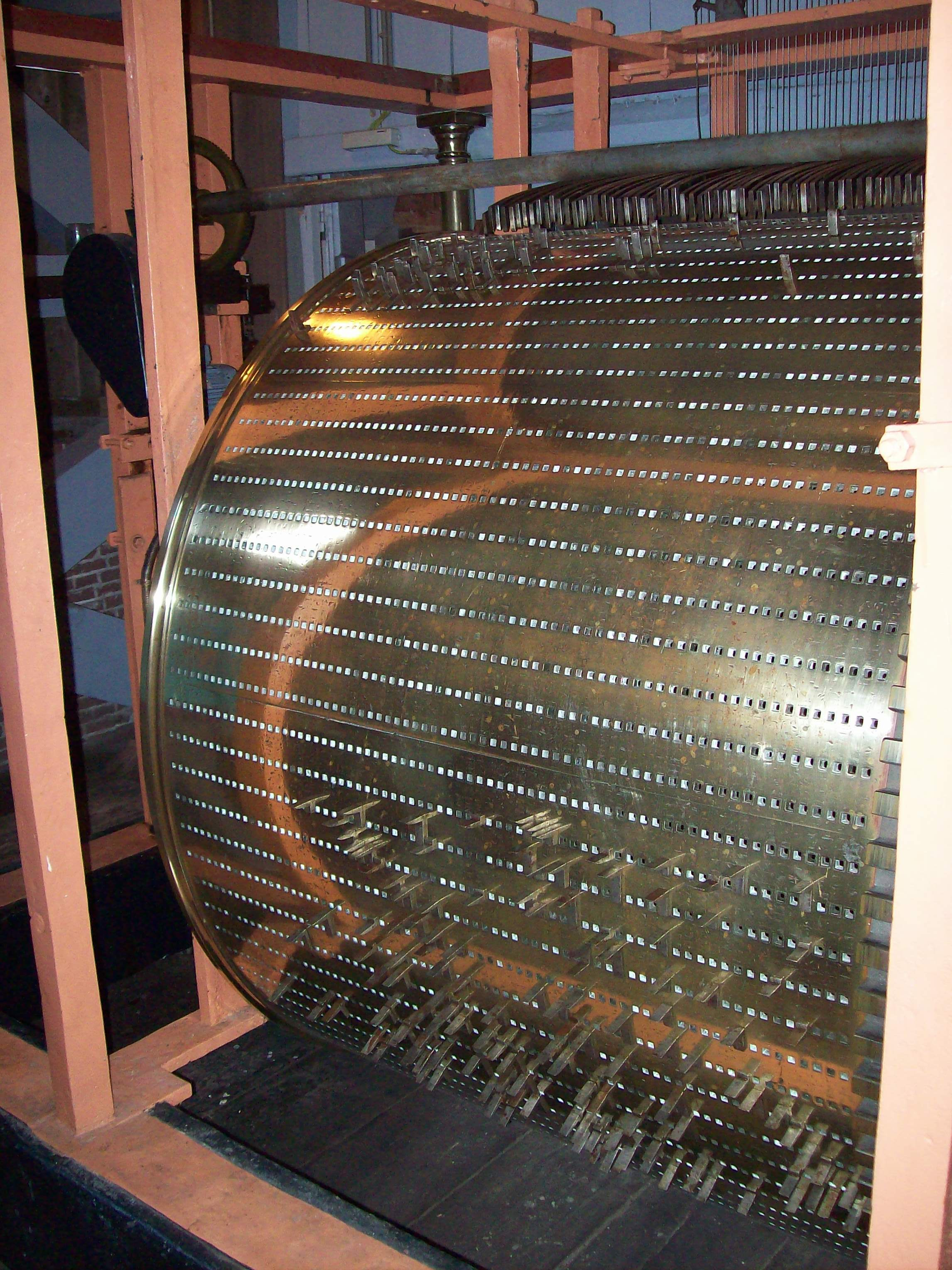 de speeltrommel voor het automatisch spel van de beiaard in de grote kerk te nijkerk